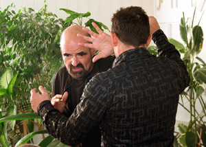 Kernspecht